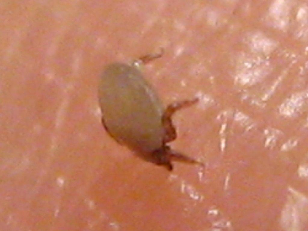 Larve des Gemeinen Holzbocks Ixodes ricinus)